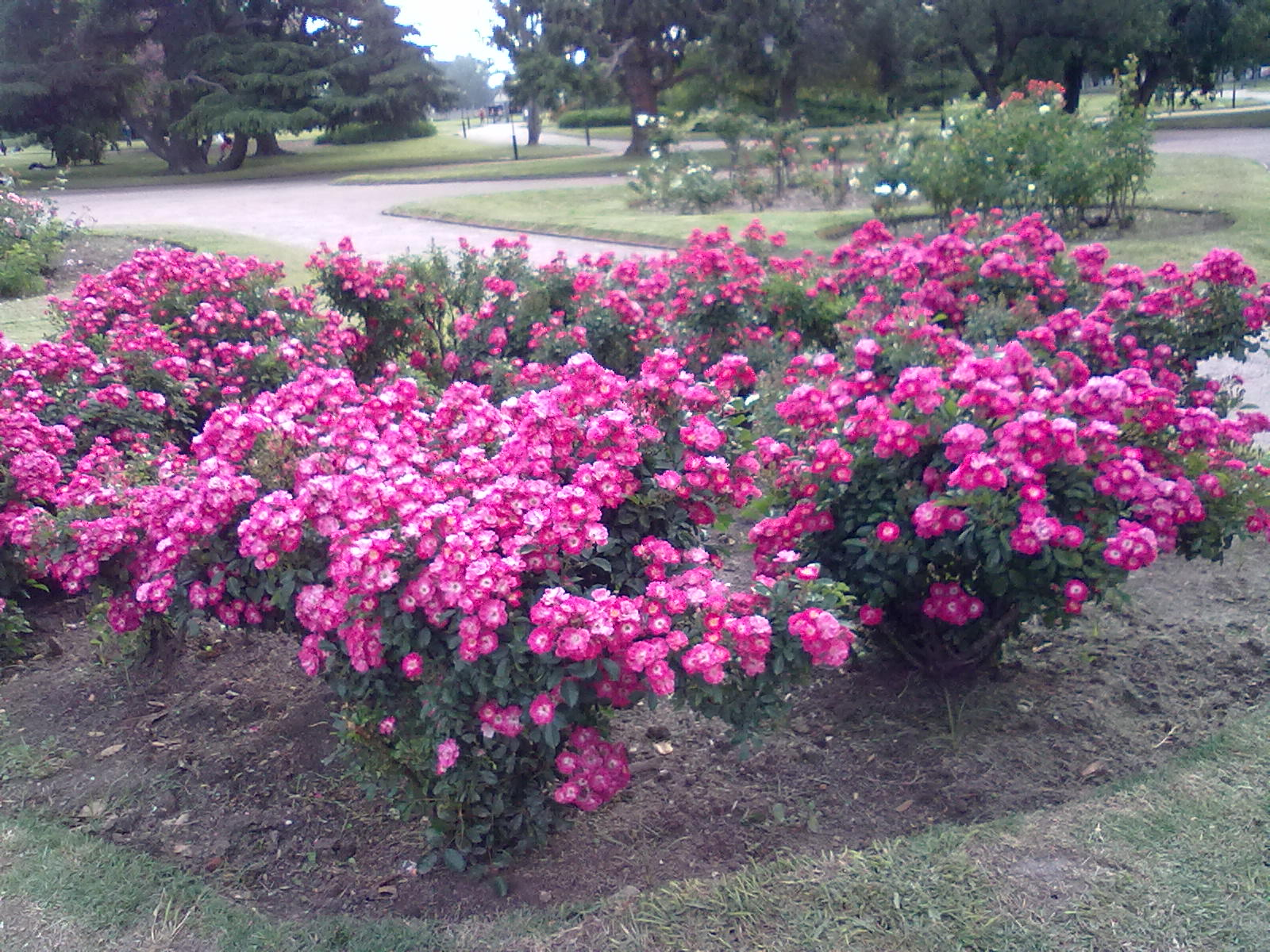 Rosedal